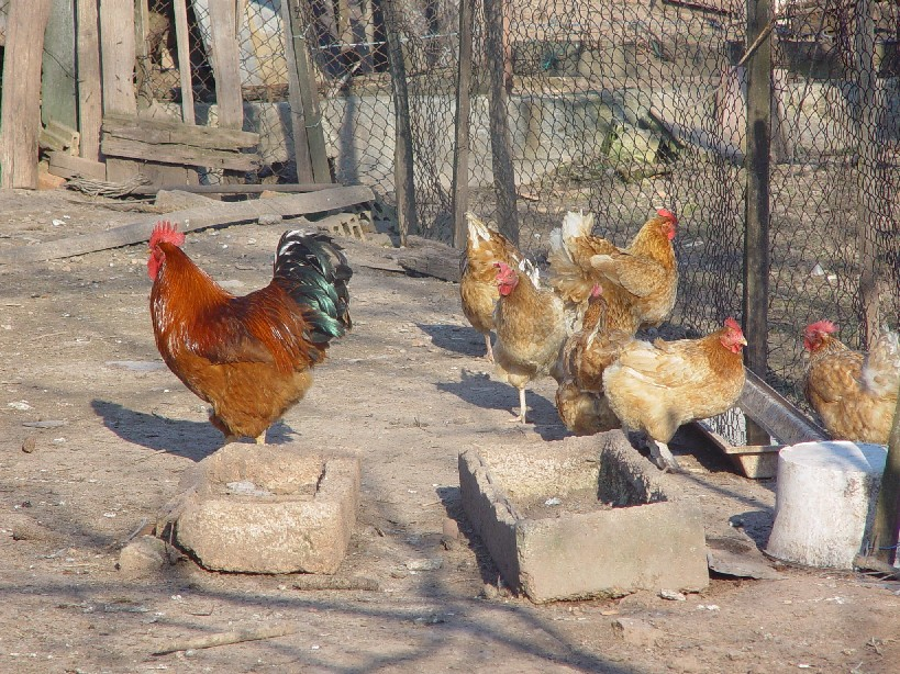 Tyúkok és egy kakas egy baromfiudvarban (Magyarország)